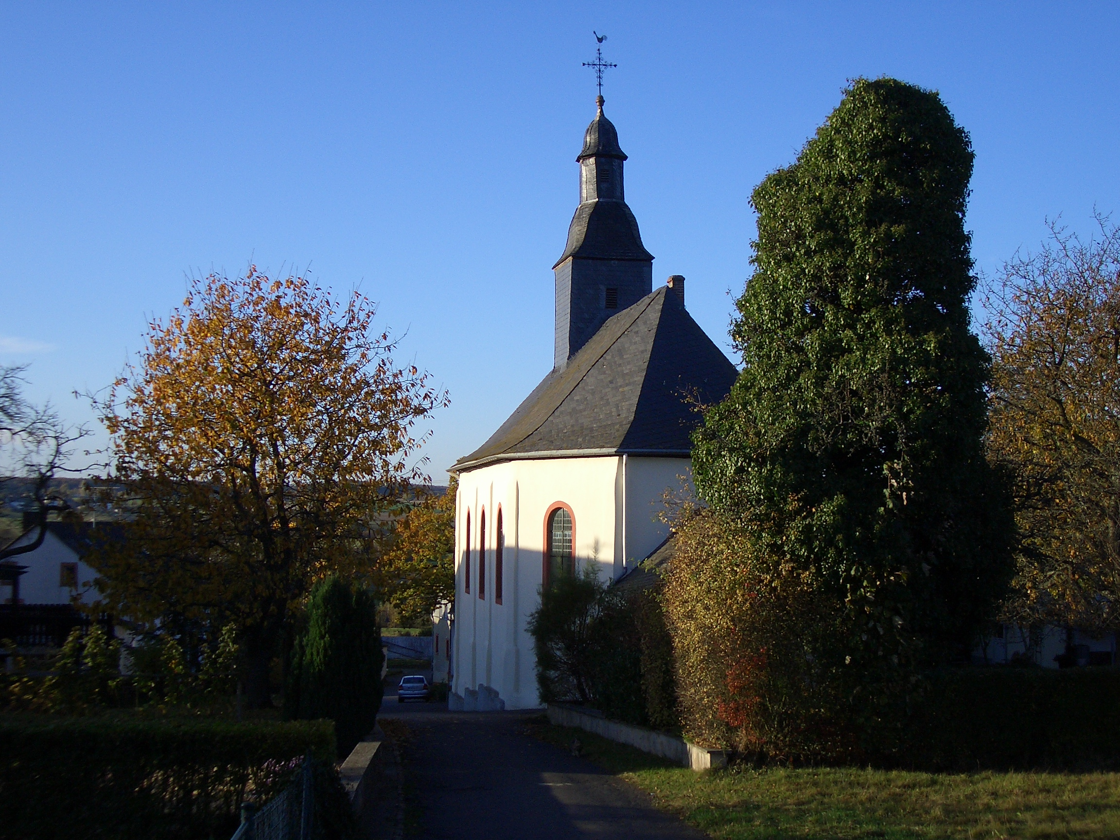 rochus